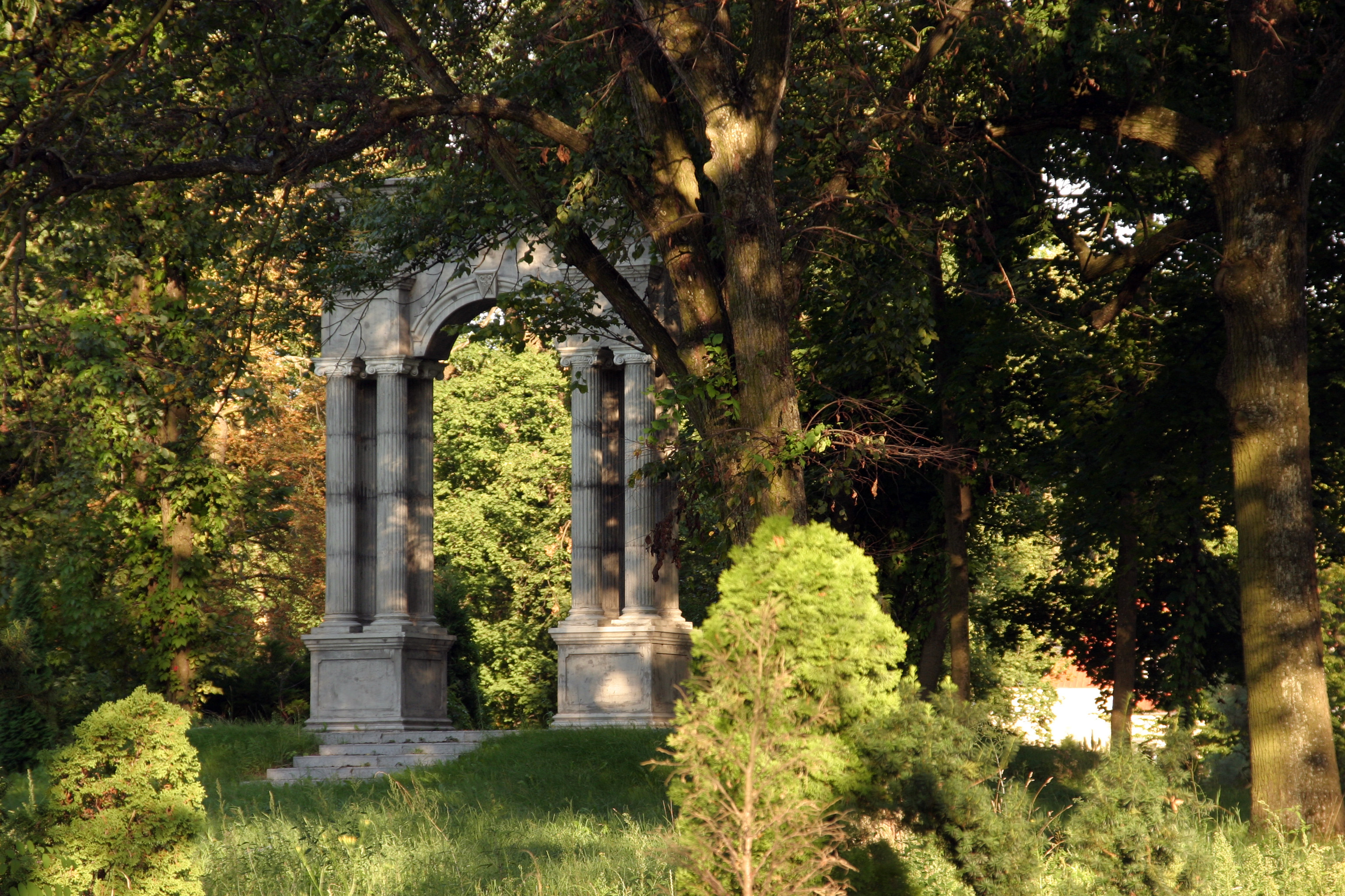 park dworski, XVIII/XIX Krubki-Górki, Poświętne